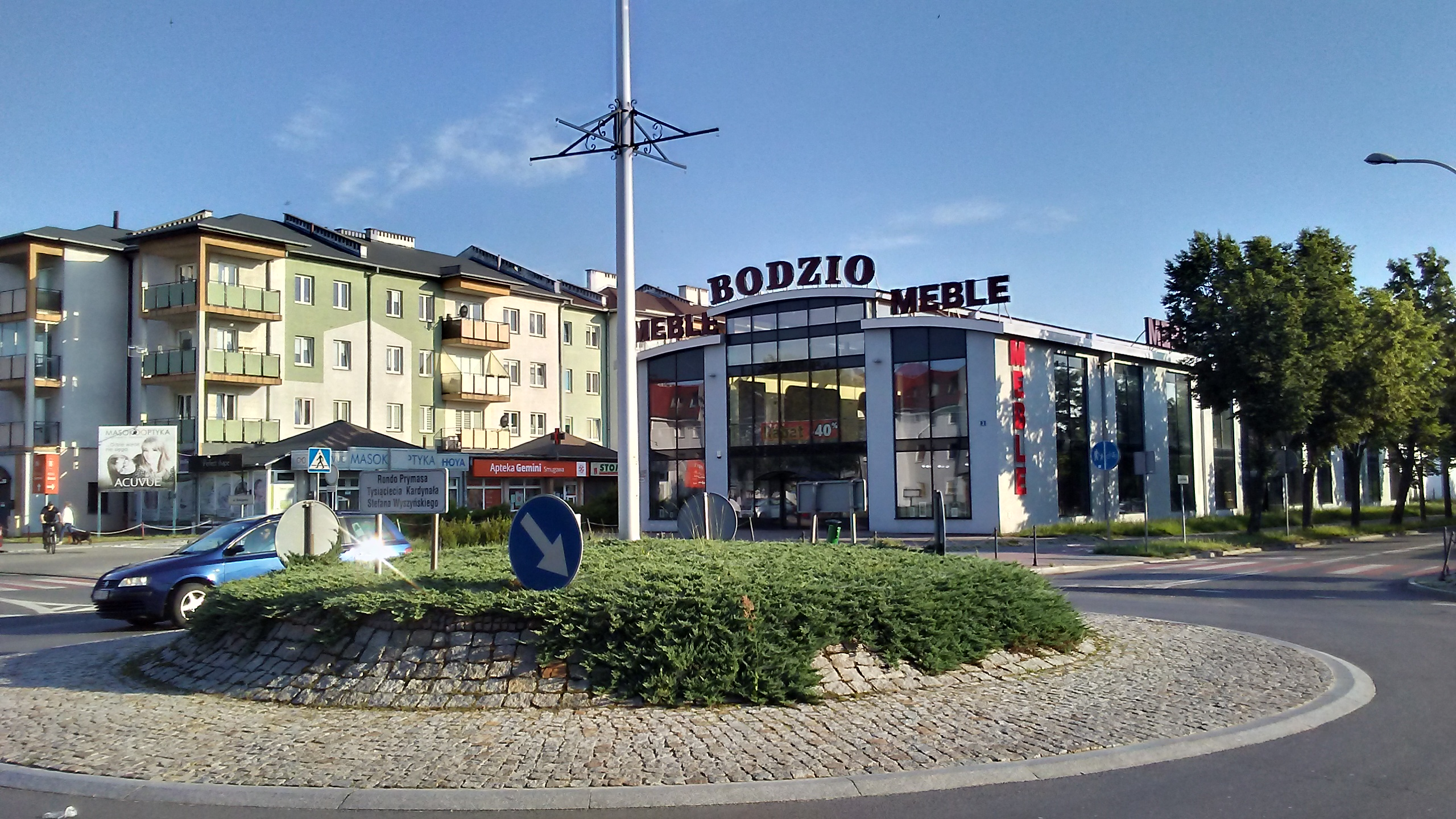 Rondo Wyszyńskiego w Tomaszowie Mazowieckim